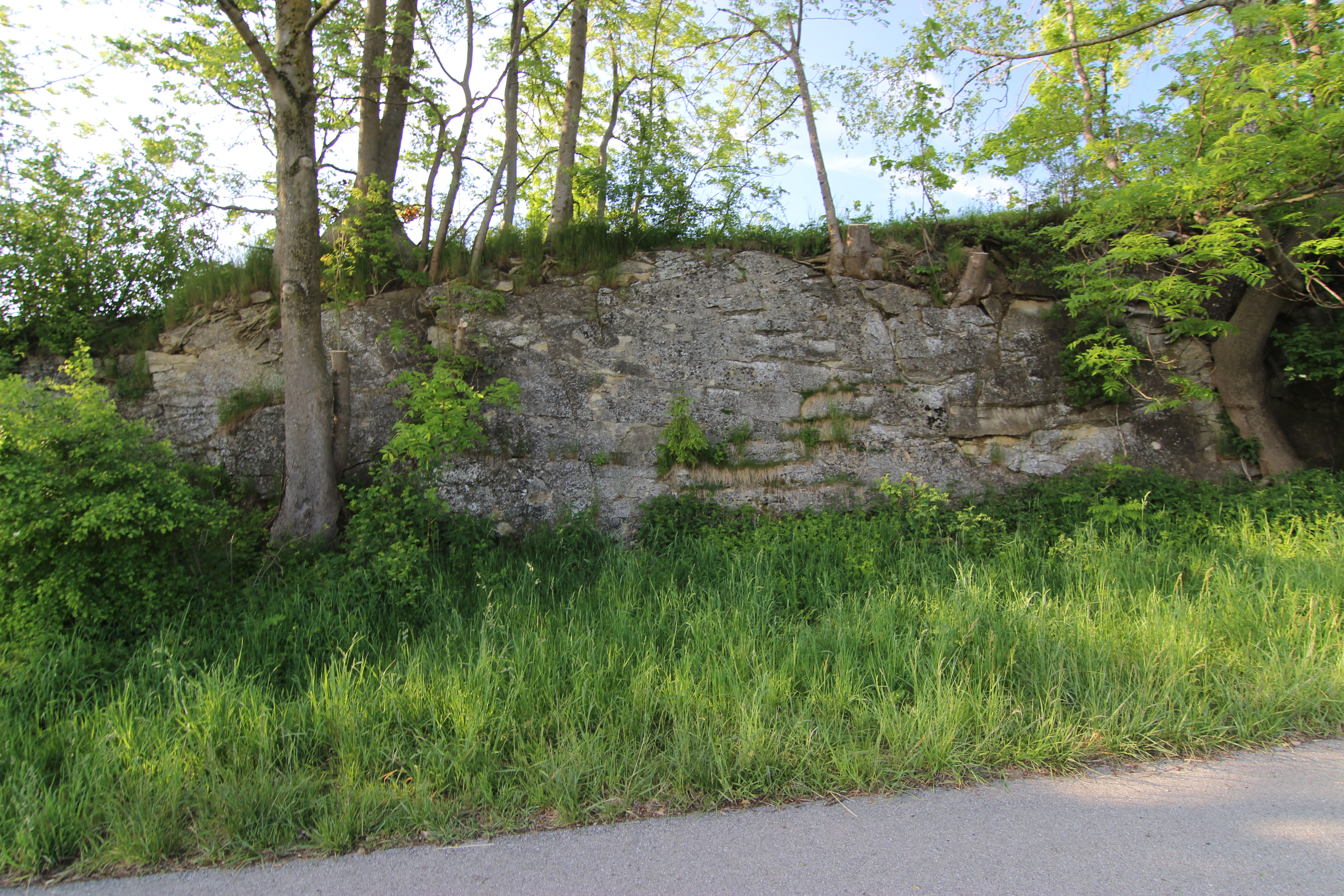 Naturdenkmal Steinbruch am Lenzfrieder Höhenrücken Listeneintrag